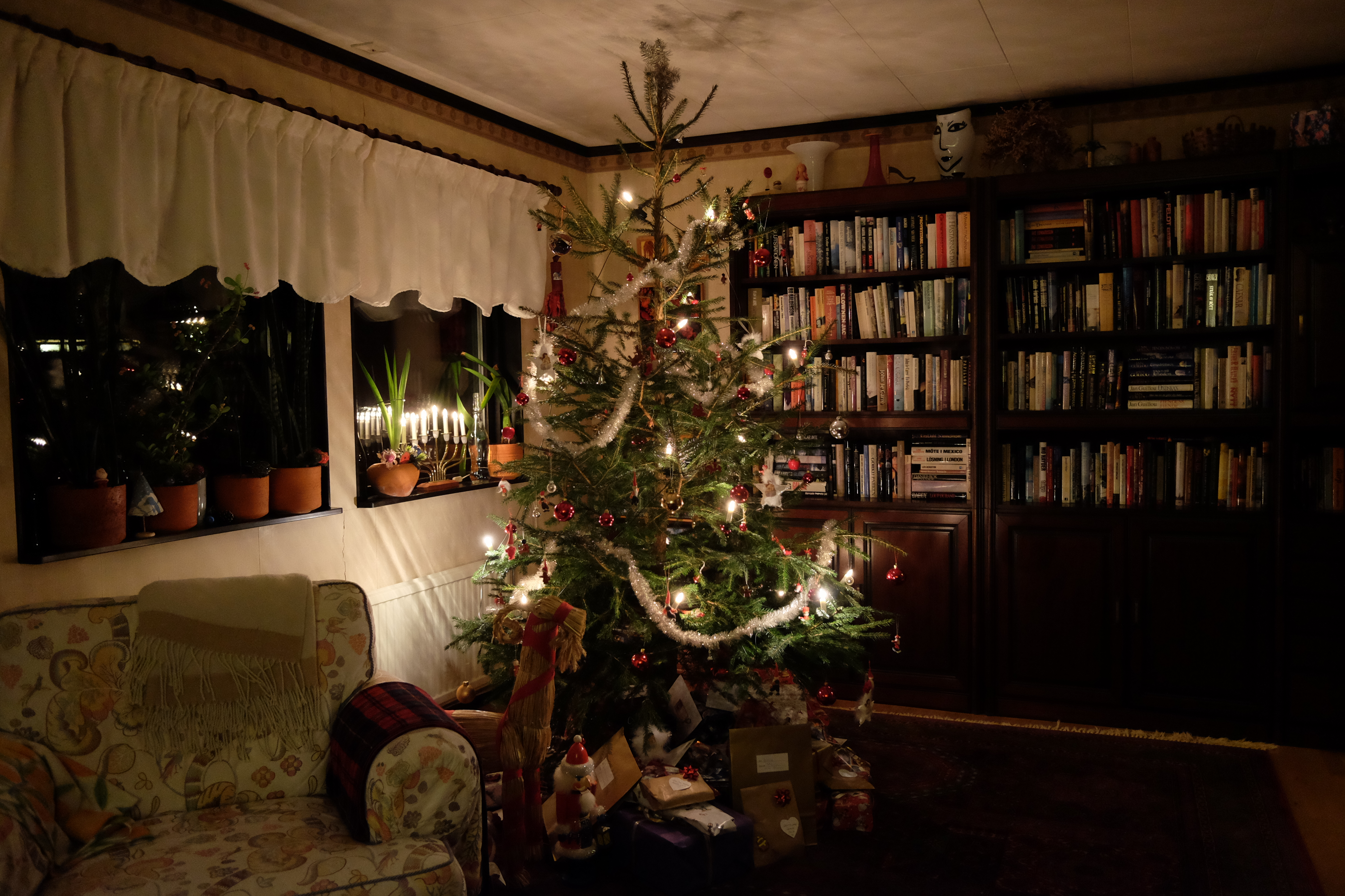 Julgran, Sverige, 2017.